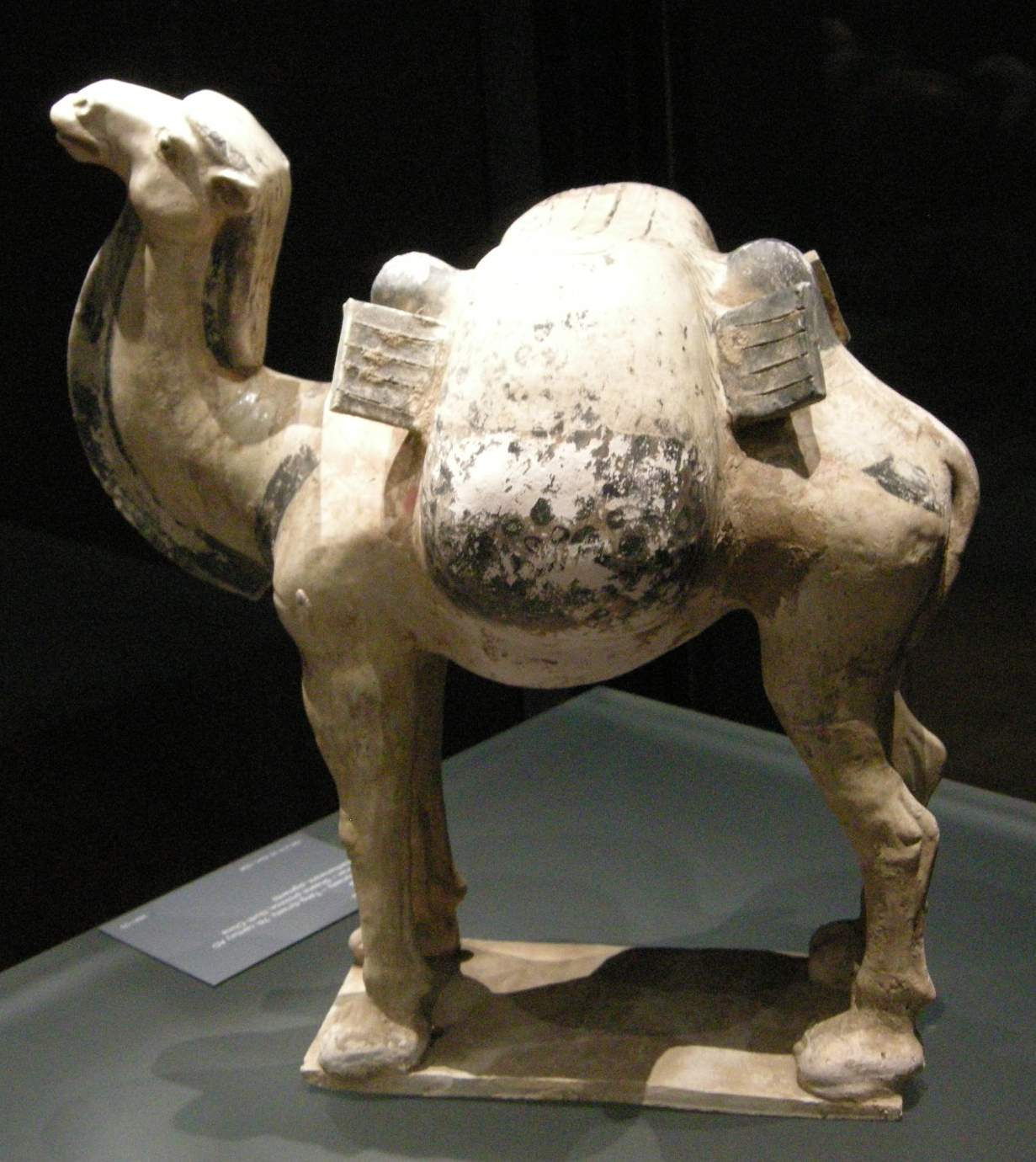 Dinastia sui-tang, cammello